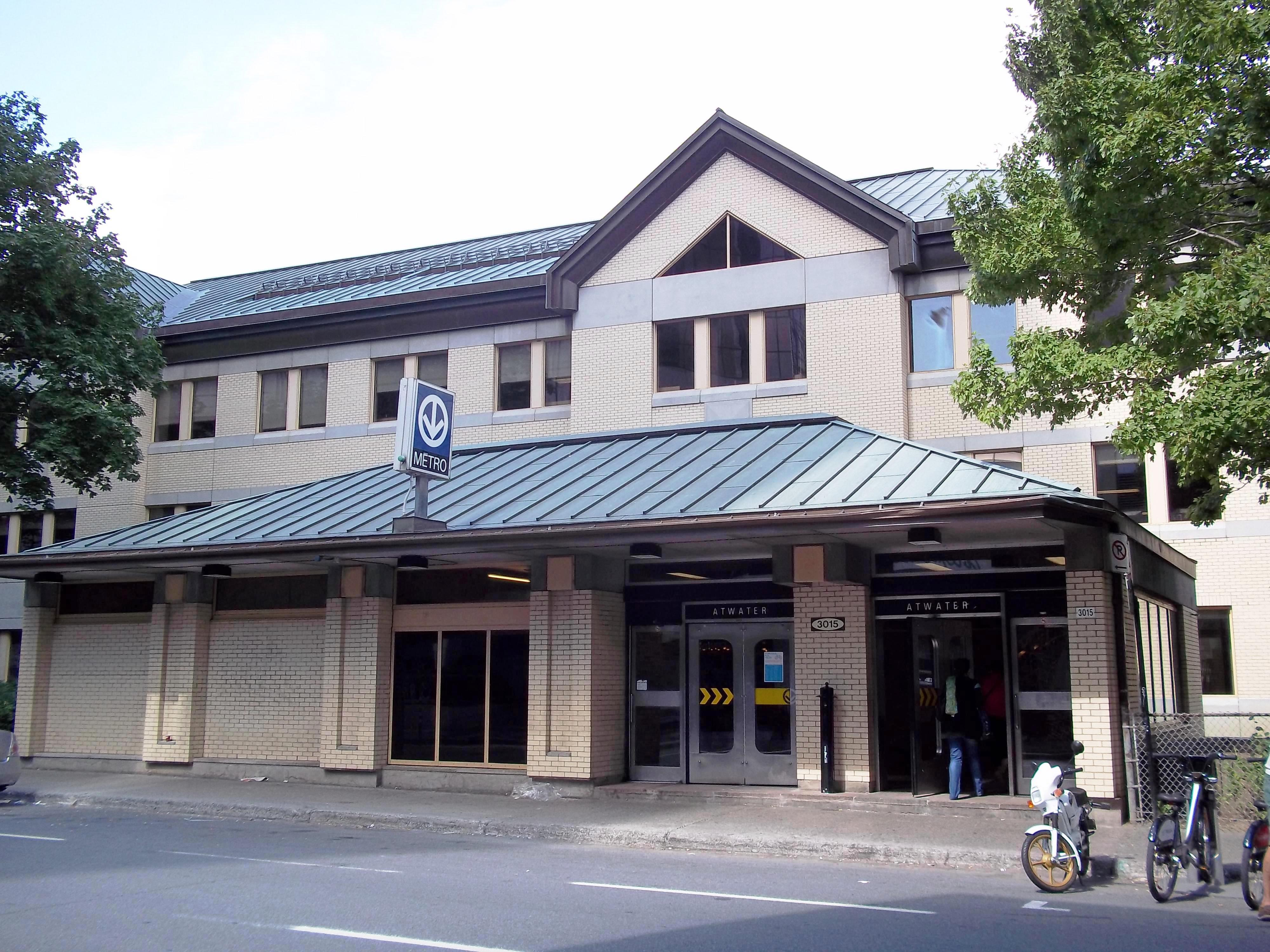 Collège Dawson (derrière la station de métro Atwater), Montréal